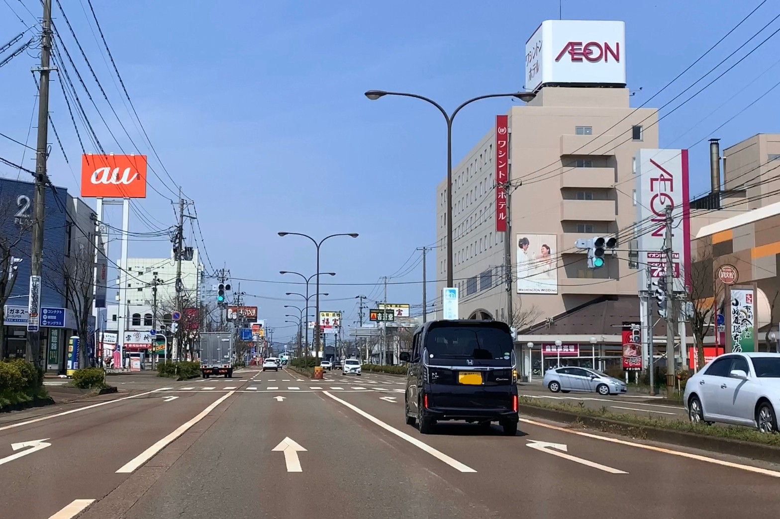 燕三条駅付近のロードサイド店舗群（新潟県燕市，2020年4月）